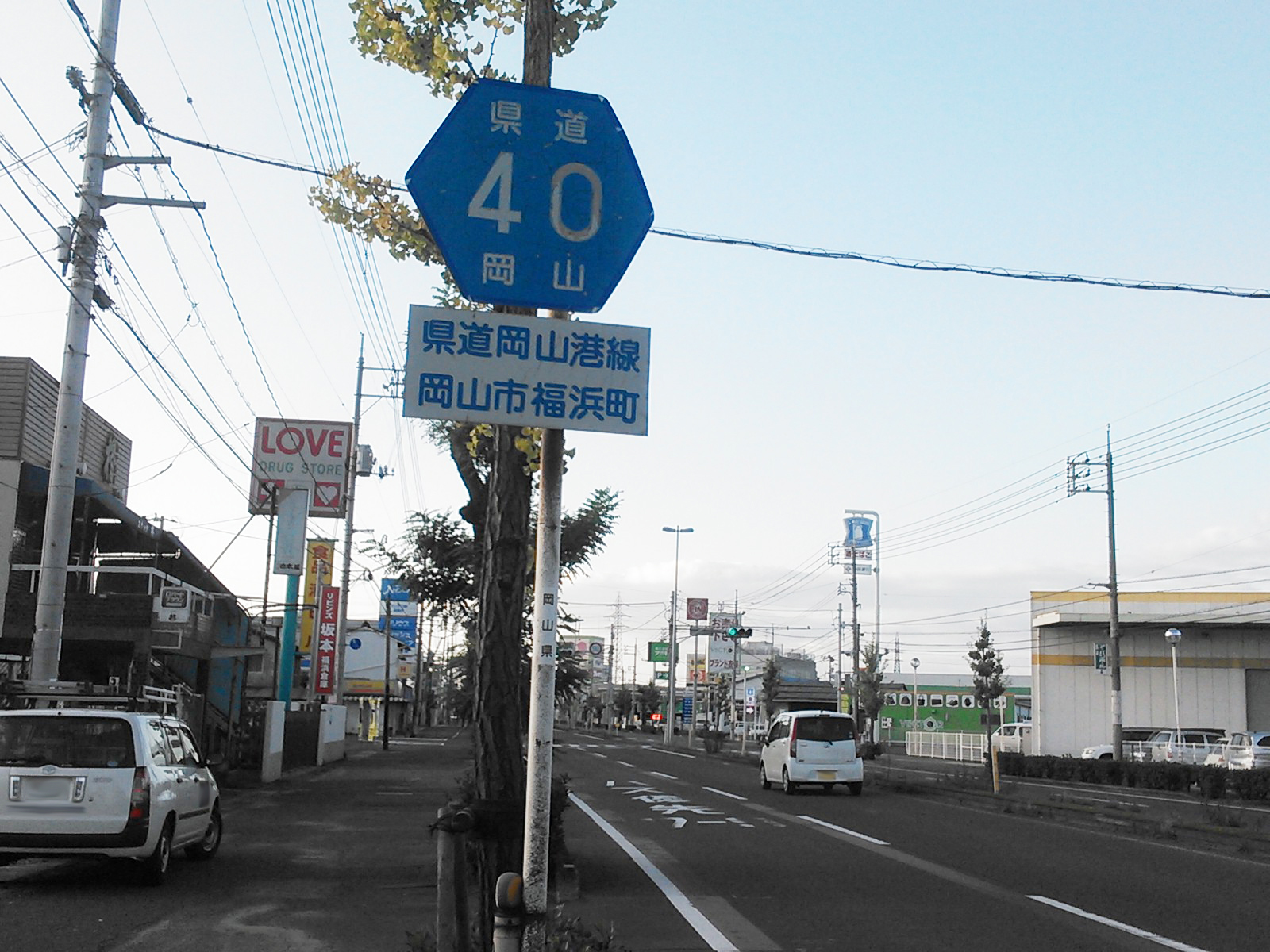 岡山県道40号岡山港線（人絹道路）、岡山市南区福浜町付近。投稿者による撮影。